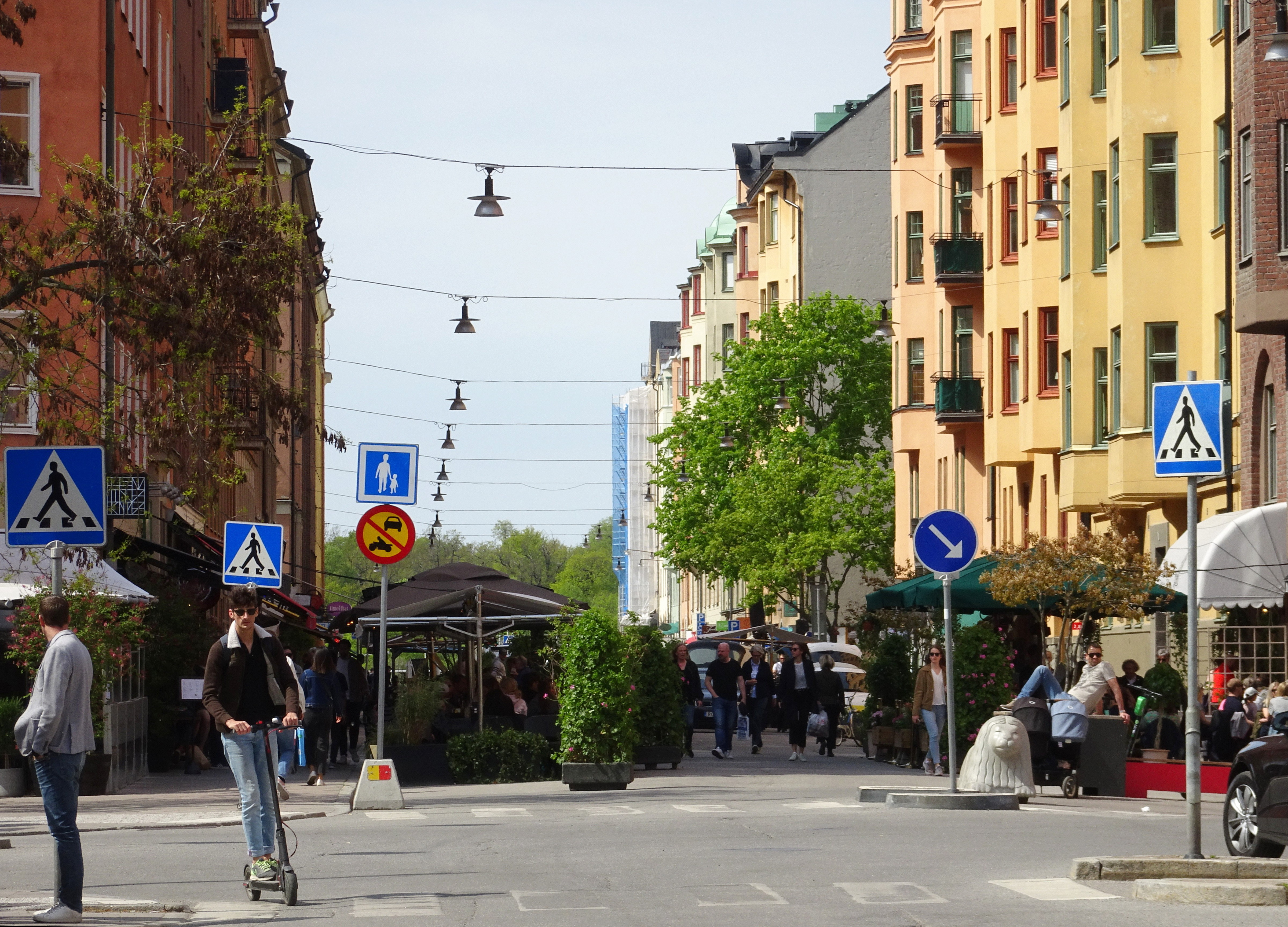 Rörstrandsgatans sommargågata (mellan Birkagatan och Norrbackagatan)